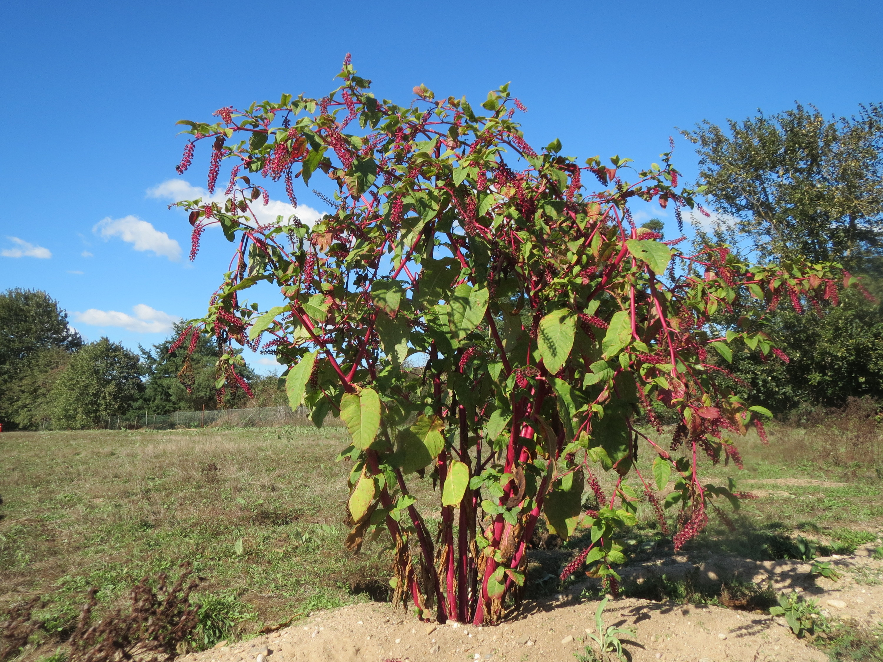 Amerikanische Kermesbeere (Phytolacca americana) - invasiv im Naturschutzgebiet Gewann Frankreich-Wiesental, Pflanze ca. 1,70 m hoch